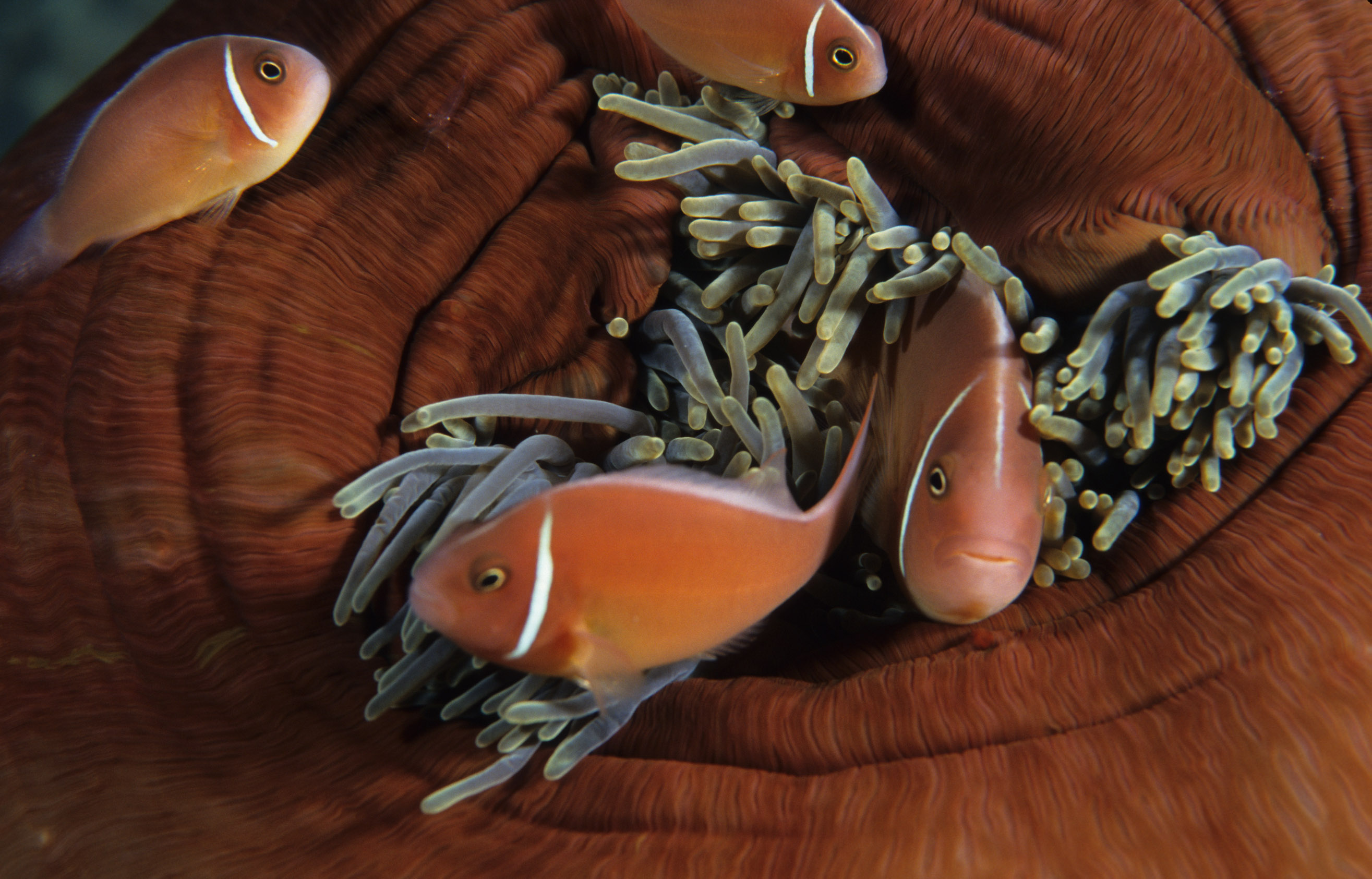 png_dive_16